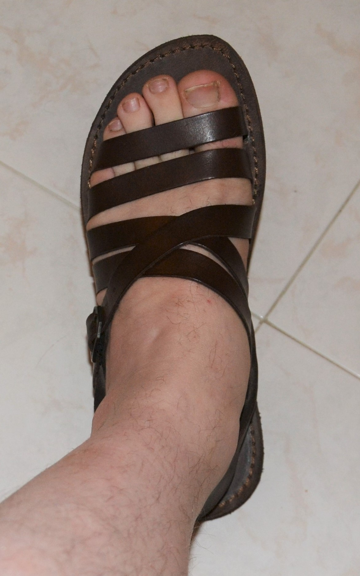 Sandali maschili salentini